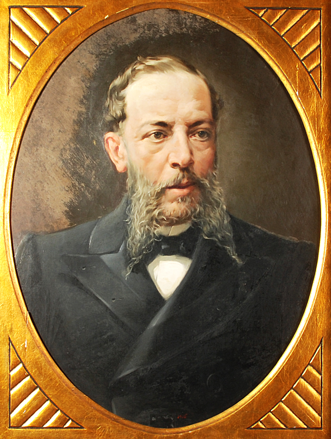 Retrat de D. Juan Torrents i de Higuero. pintura sobre tela. Biblioteca Museu Víctor Balaguer